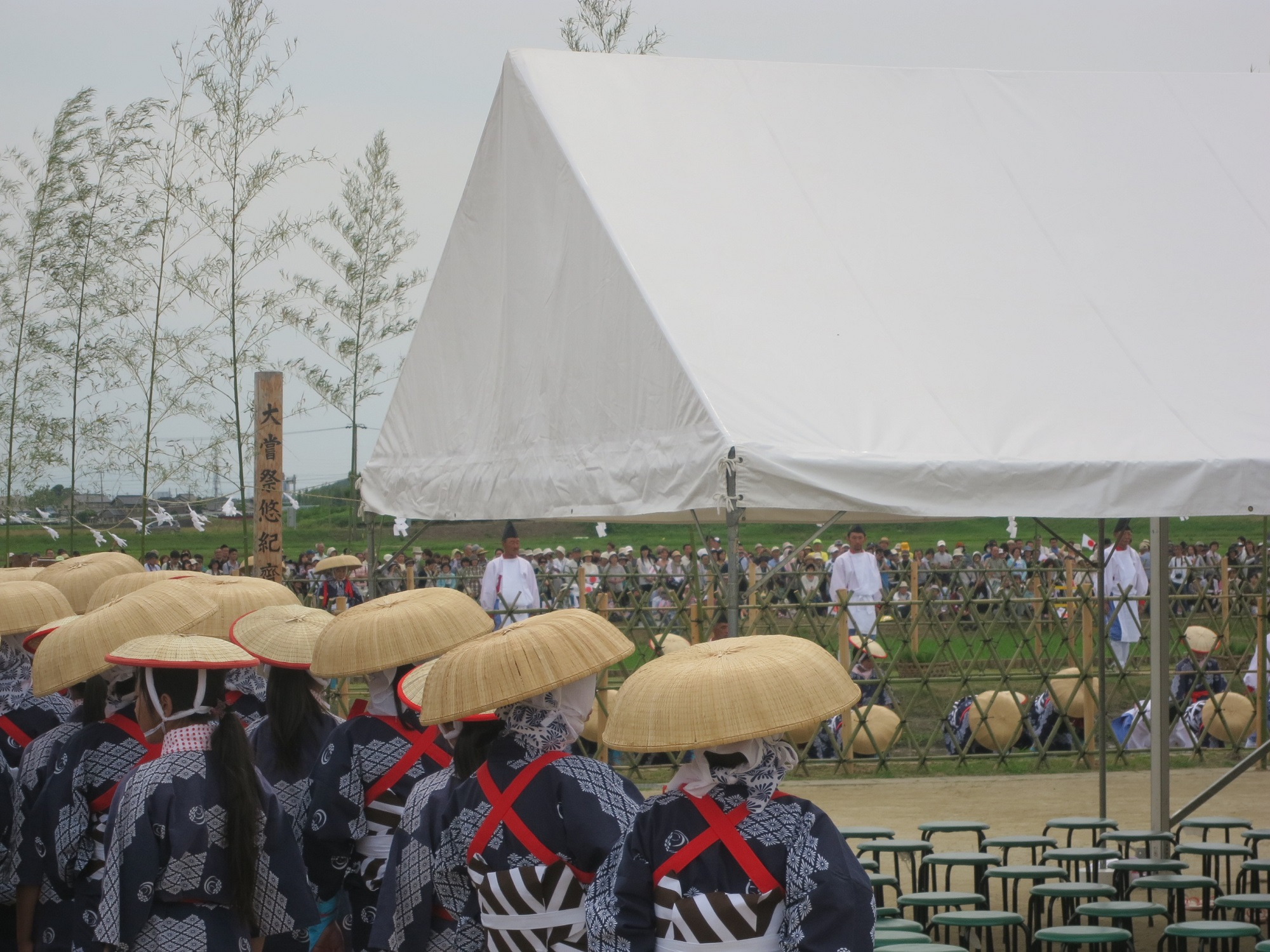 悠紀斎田お田植えまつり（岡崎市中島町）